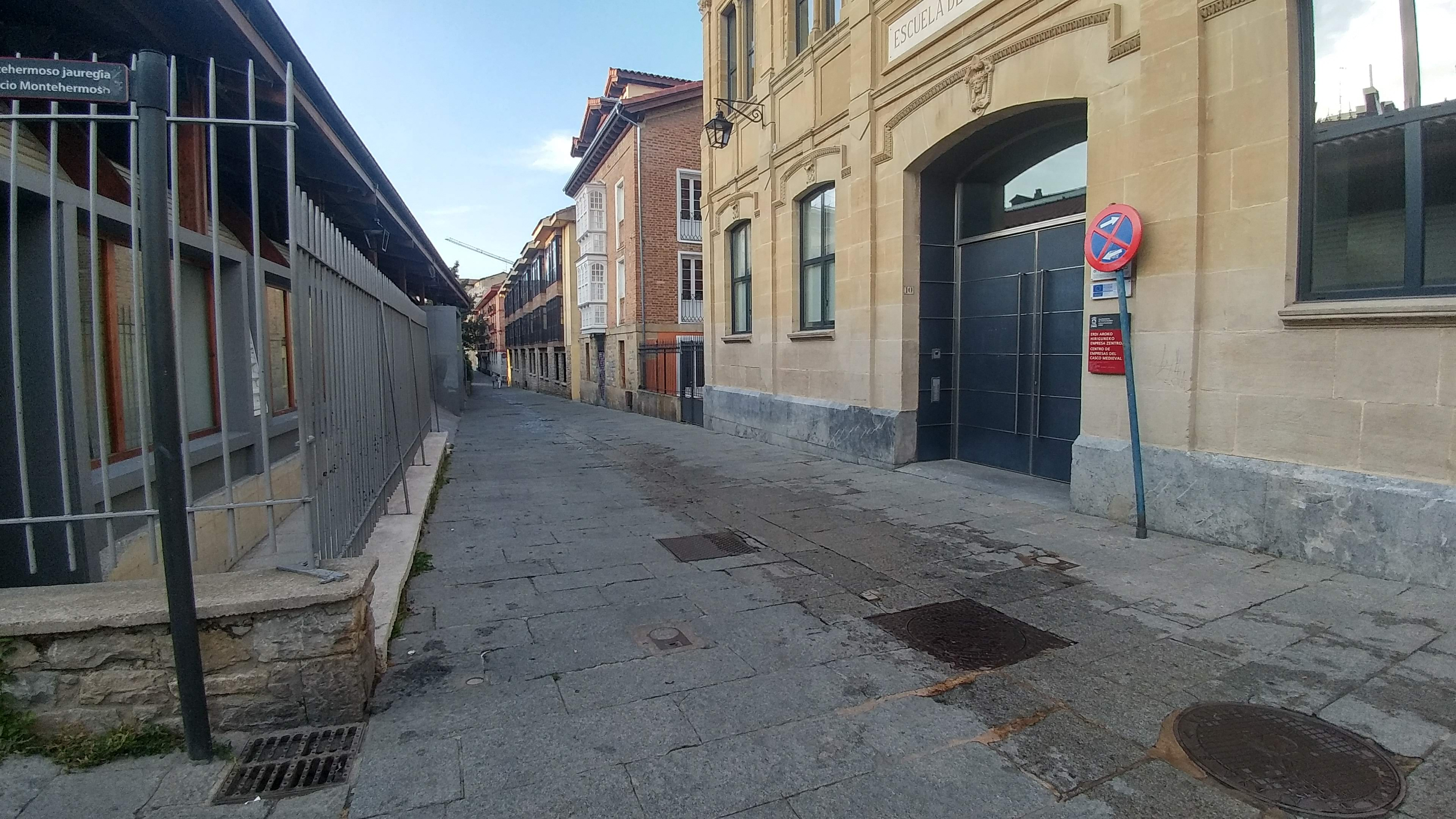 Gasteizko Alde Zaharreko kalea